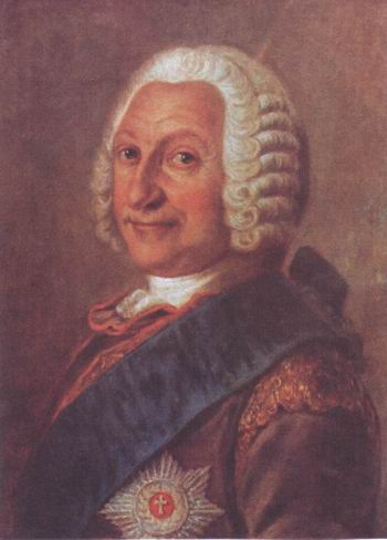 Adolf Friedrich III, Duke of Mecklenburg-Strelitz (1658-1708)